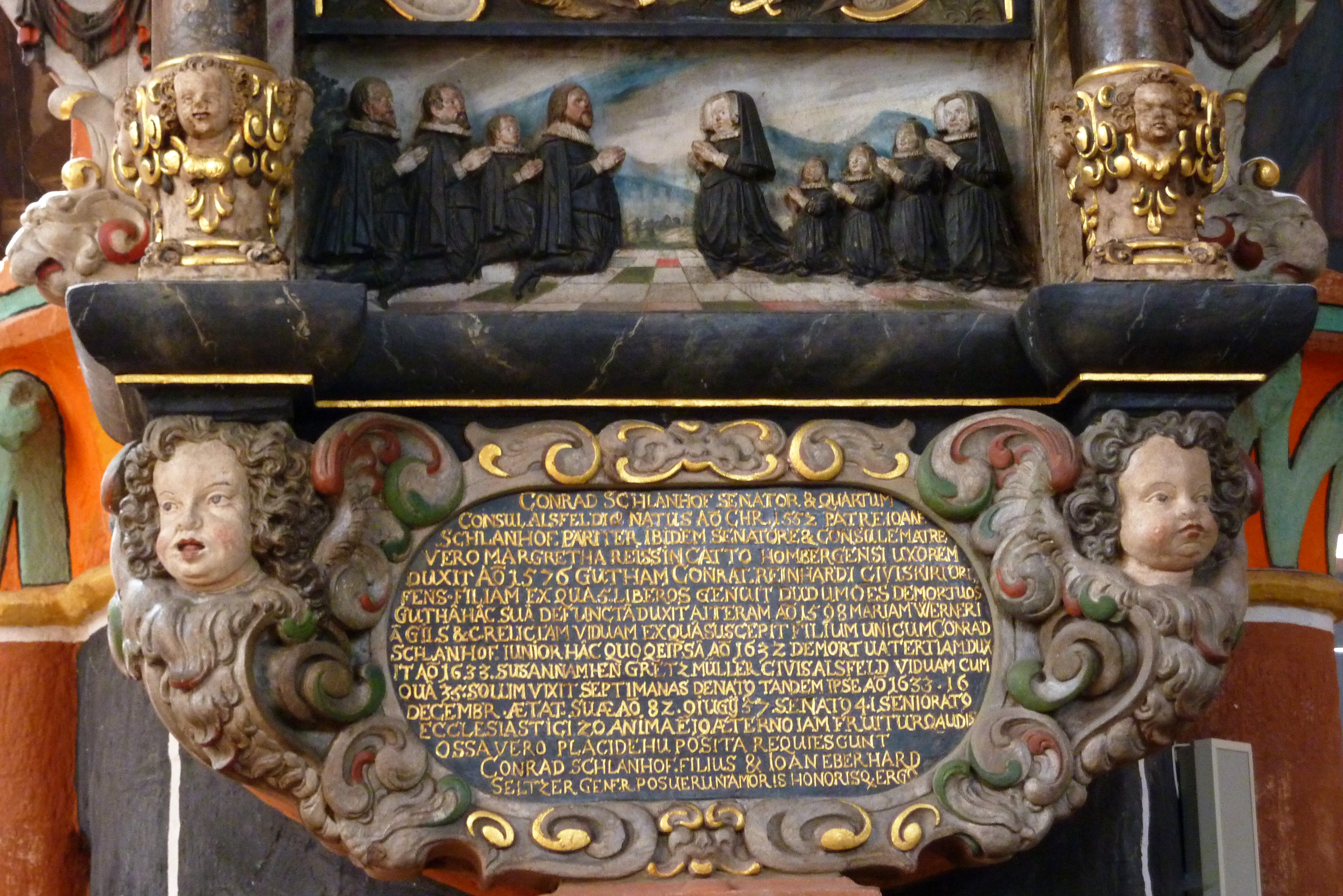 Evangelische Walpurgiskirche in Alsfeld im Vogelsbergkreis (Hessen), Epitaph für Conrad Schlanhof von 1633 (Detail)